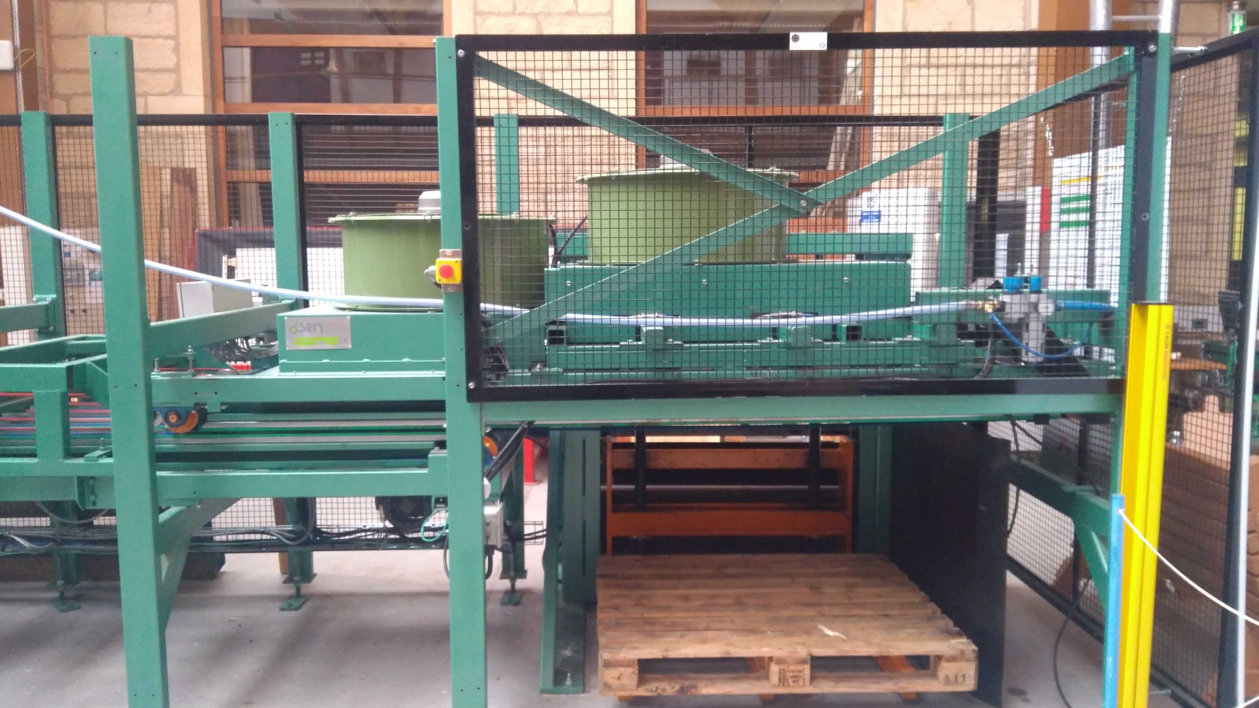 En fin de ligne, les placages sont maintenus par les ventilateurs, un bras vient les faire tomber pour les empiler sur la palette.